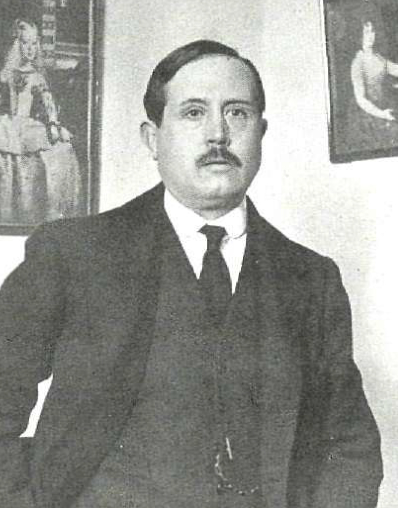 Azorín en su gabinete de trabajo.